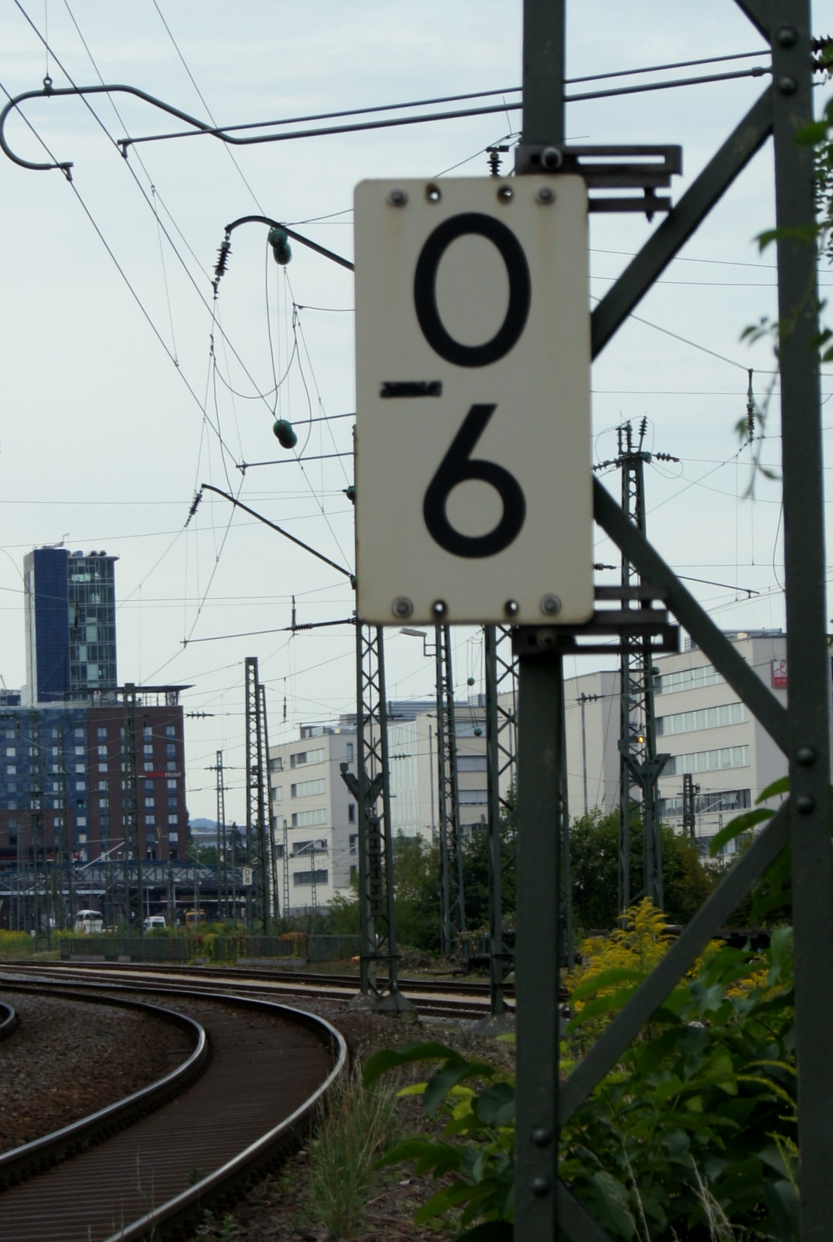 Negativer Streckenkilometer vor dem Freiburger Hauptbahnhof. Da die Höllentalbahn in den 1930er Jahren umtrassiert wurde.